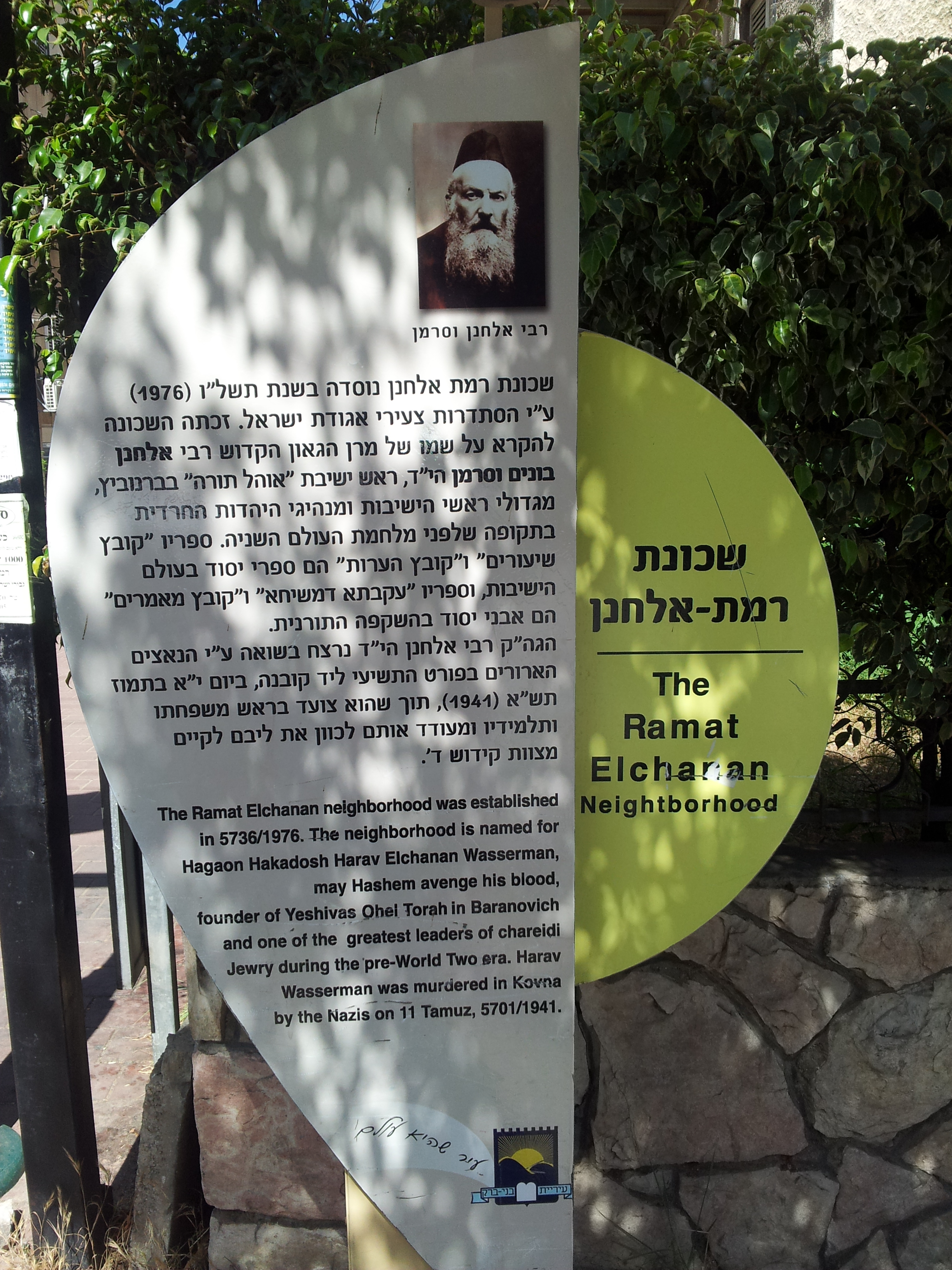 שלט כניסה, בכניסה לשכונת רמת אלחנן.